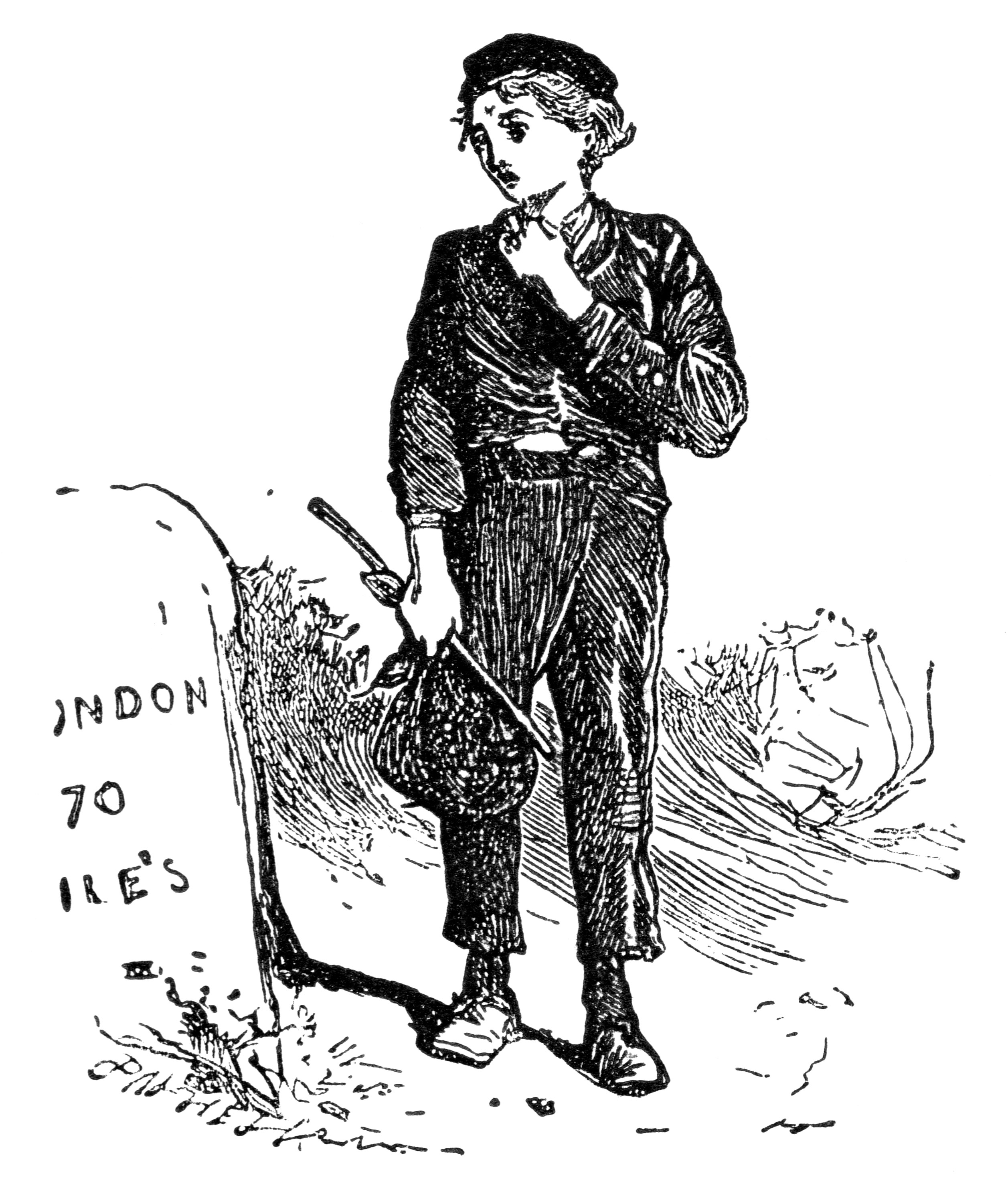 Framsida till boken Oliver Twist: Samhällsroman från 1898